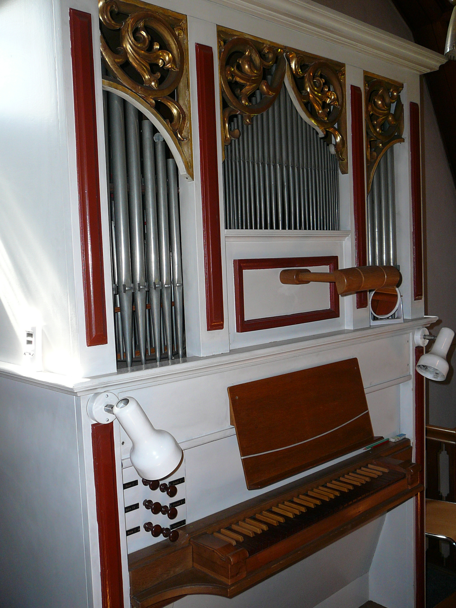 Römisch-katholische Kirche St. Christophorus, Niederhasli